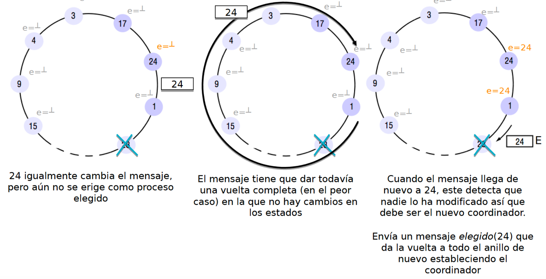 Segunda parte del ejemplo gráfico de un algoritmo de elección de líder en anillo.